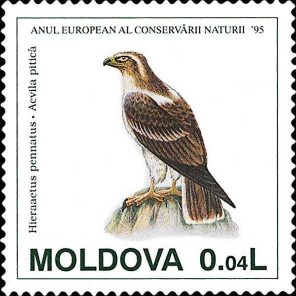 Орёл-карлик на молдавской почтовой марке (1995)